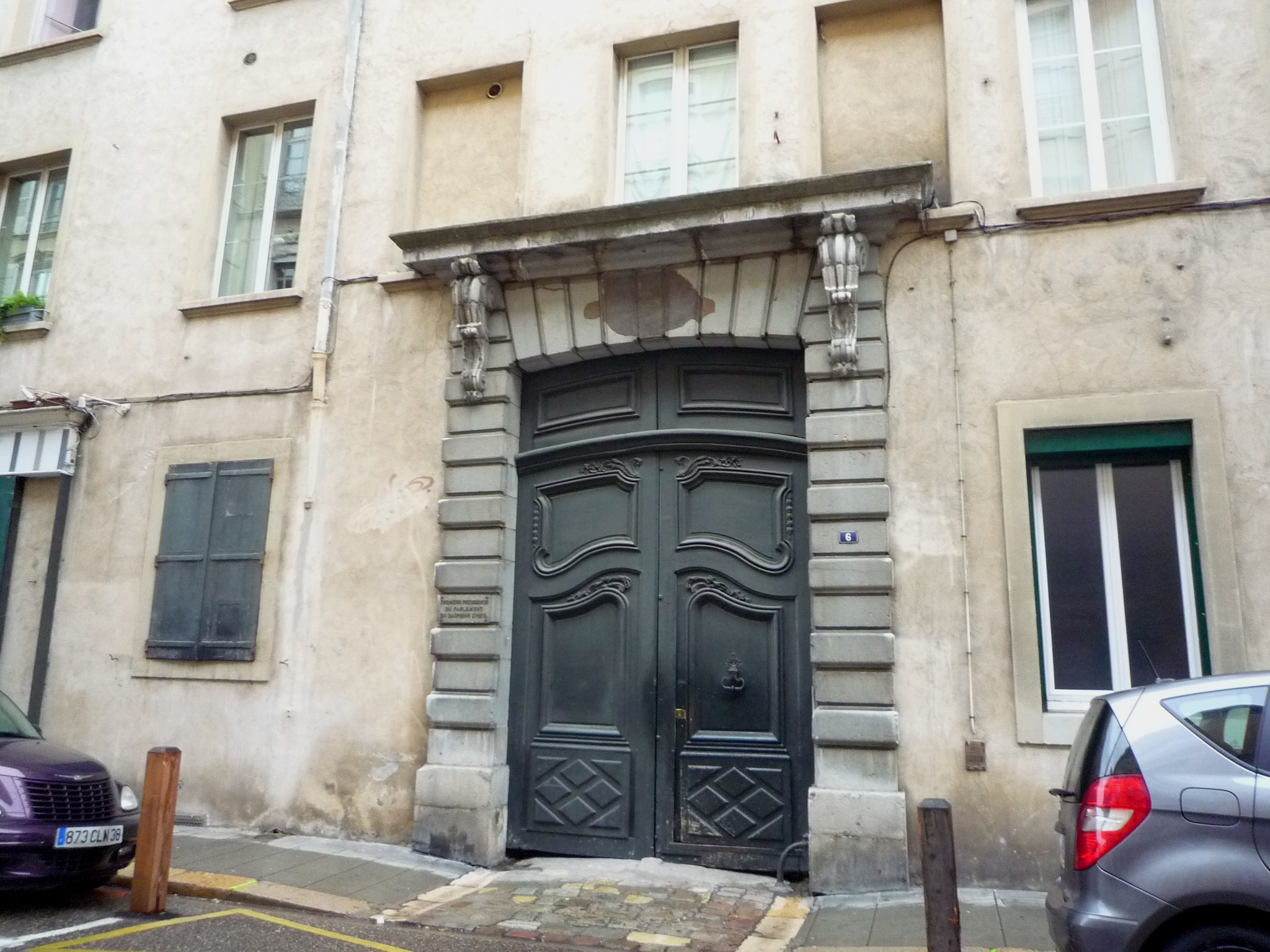 Hôtel de la Première présidence, 6 rue Voltaire - Grenoble